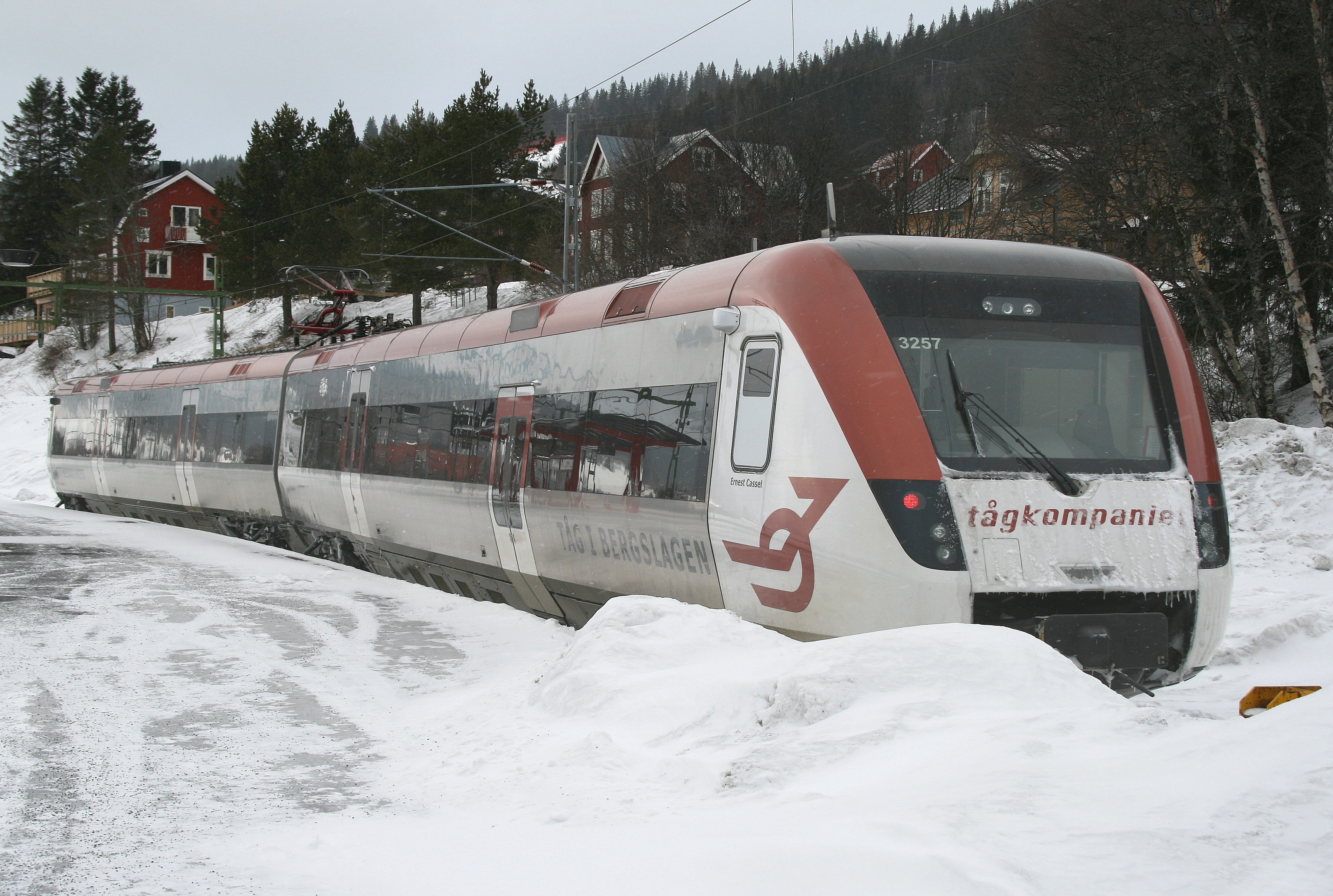 Ett Regina-tåg tillhörande Tågkompaniet står i Åre